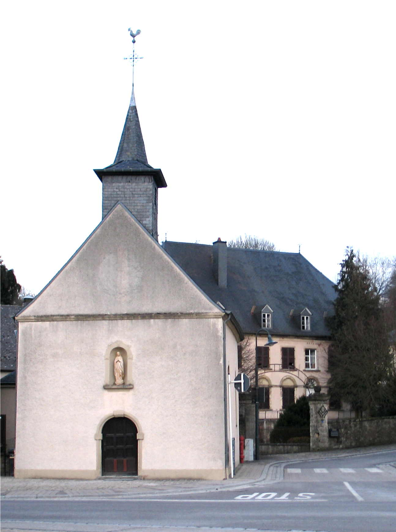 D'Kapell zu Eesebur